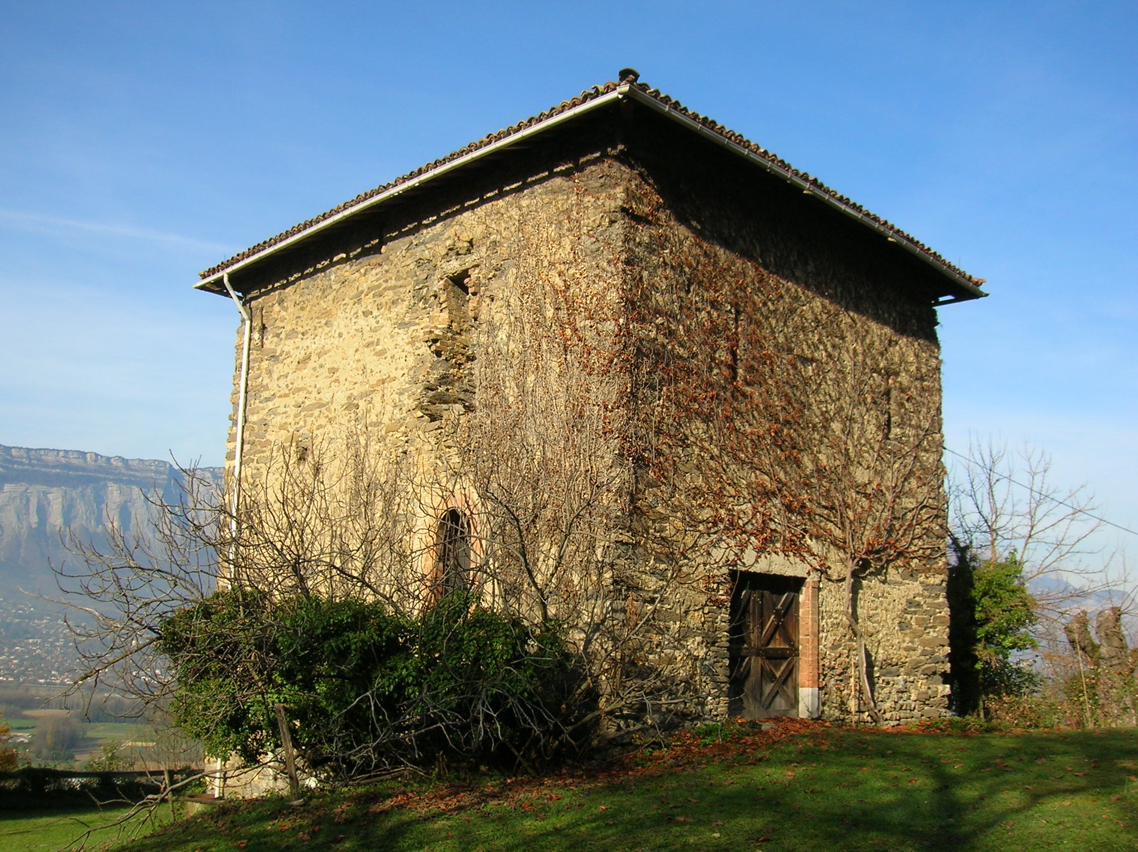 Tour Ravier ou Tour du diable, à Murianette.